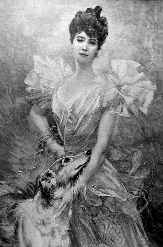 Germaine Brice, épouse de Paul Deschanel, président de la IIIe République française